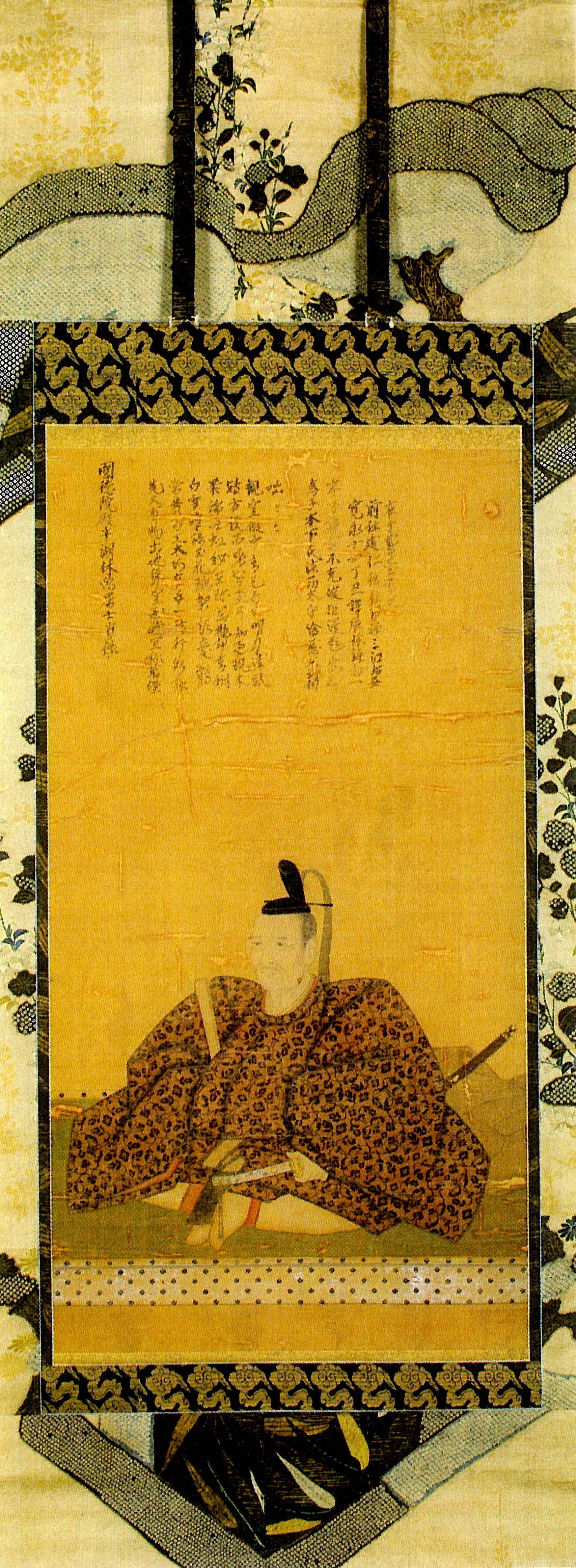 木下利房の肖像。